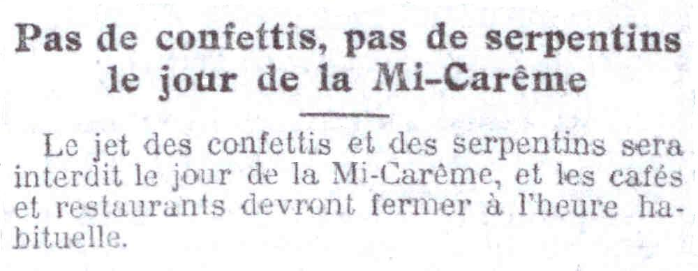 Mesures contre le Carnaval de Paris prises en 1919.